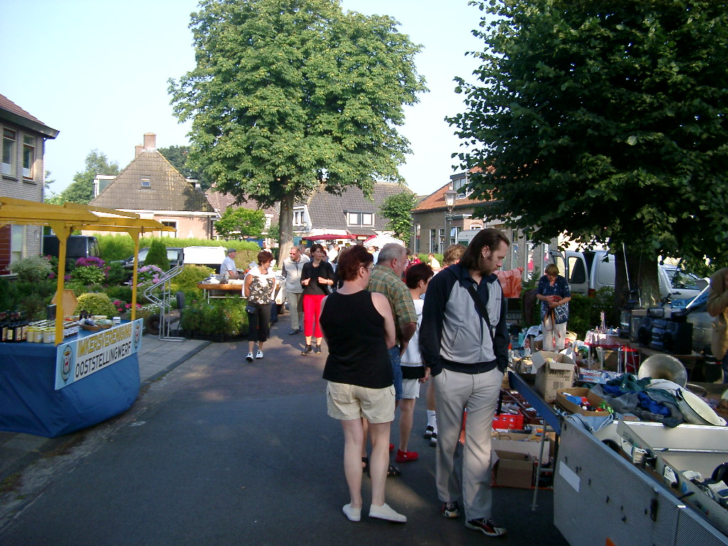 Makkingae, Rommelmerk